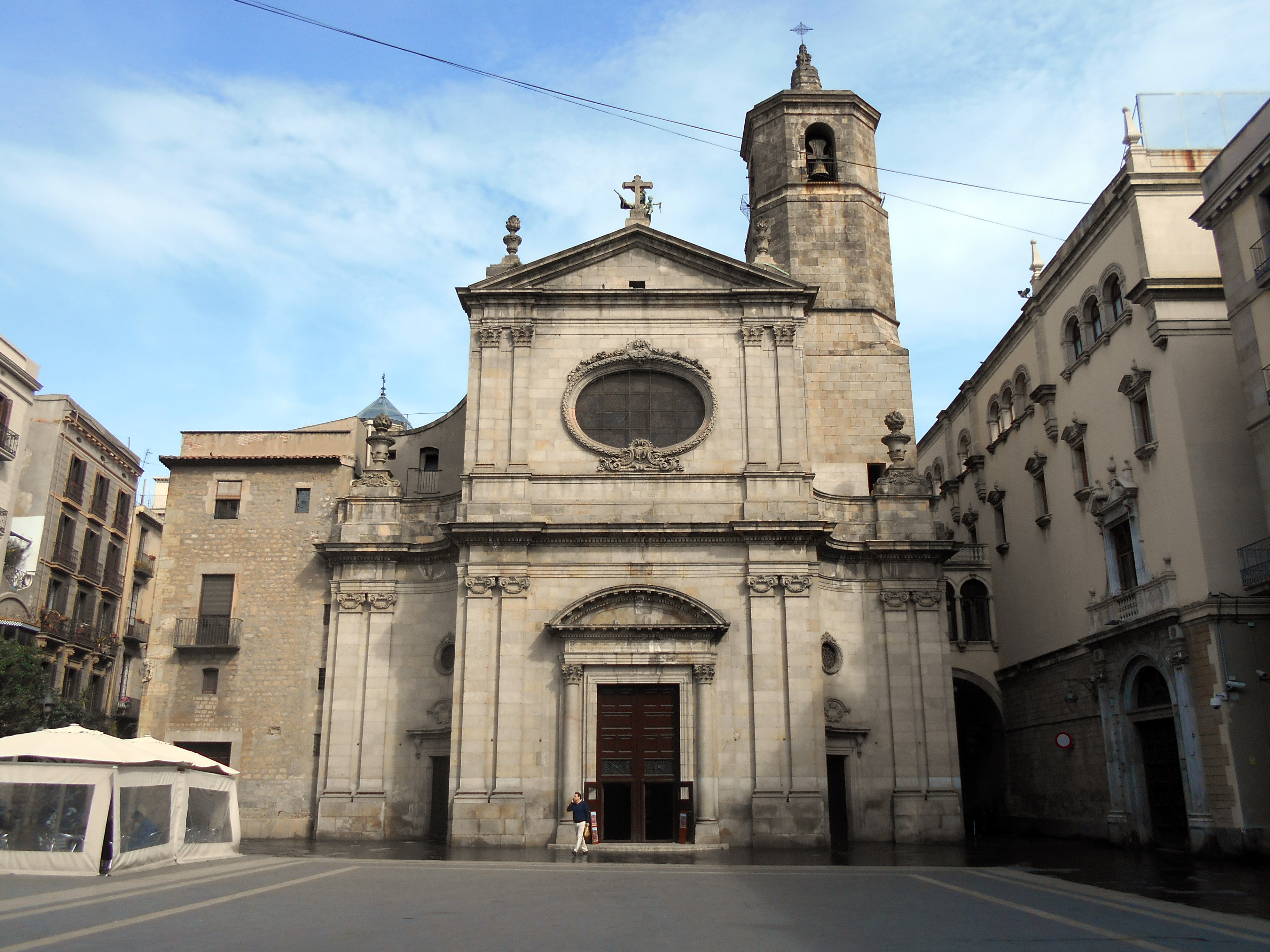 Basílica de la Merced.